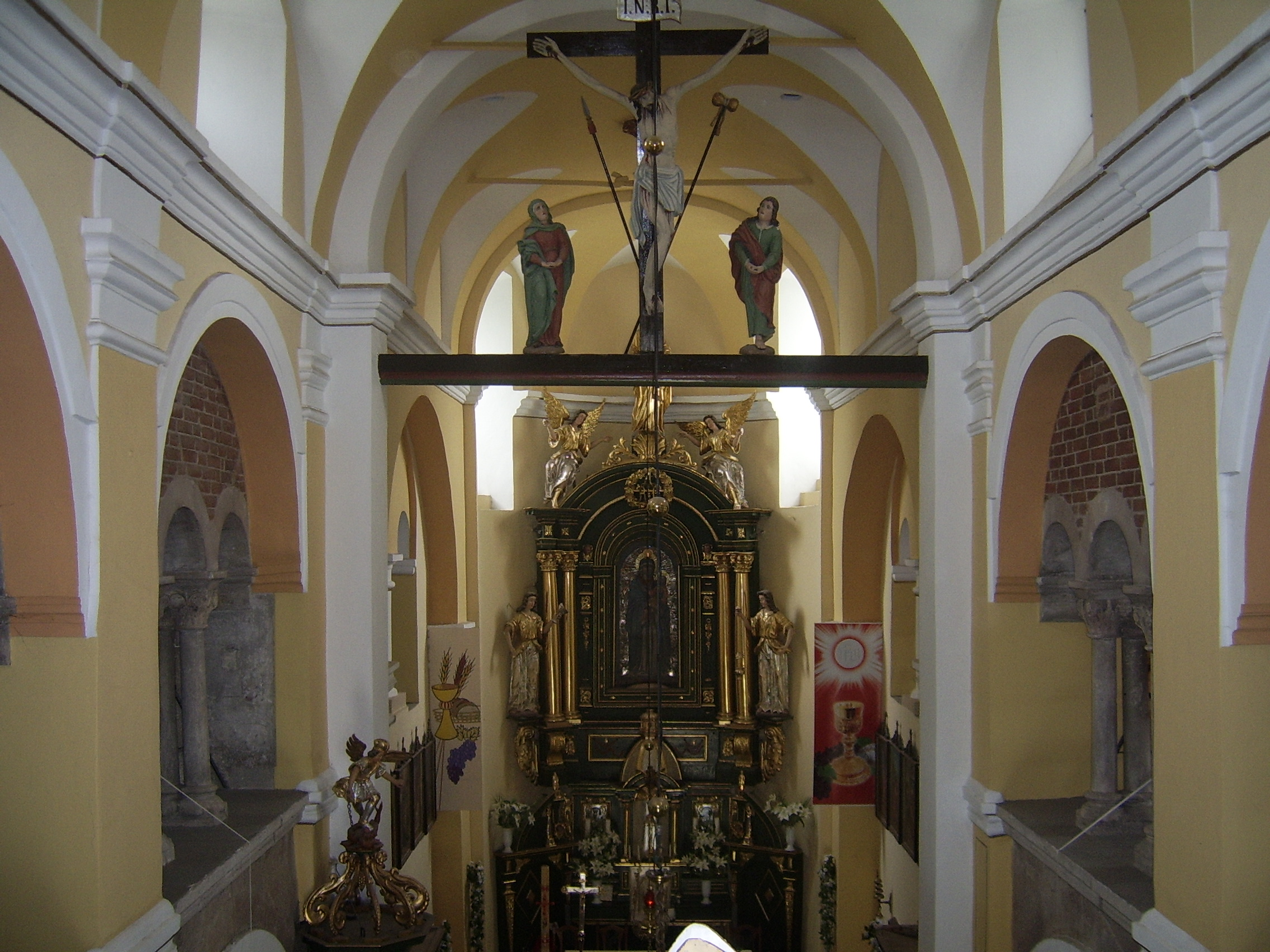 Kościelec (województwo małopolskie) - kościół pw. św. Wojciecha. Wnętrze, widok z chóru na nawę główną.